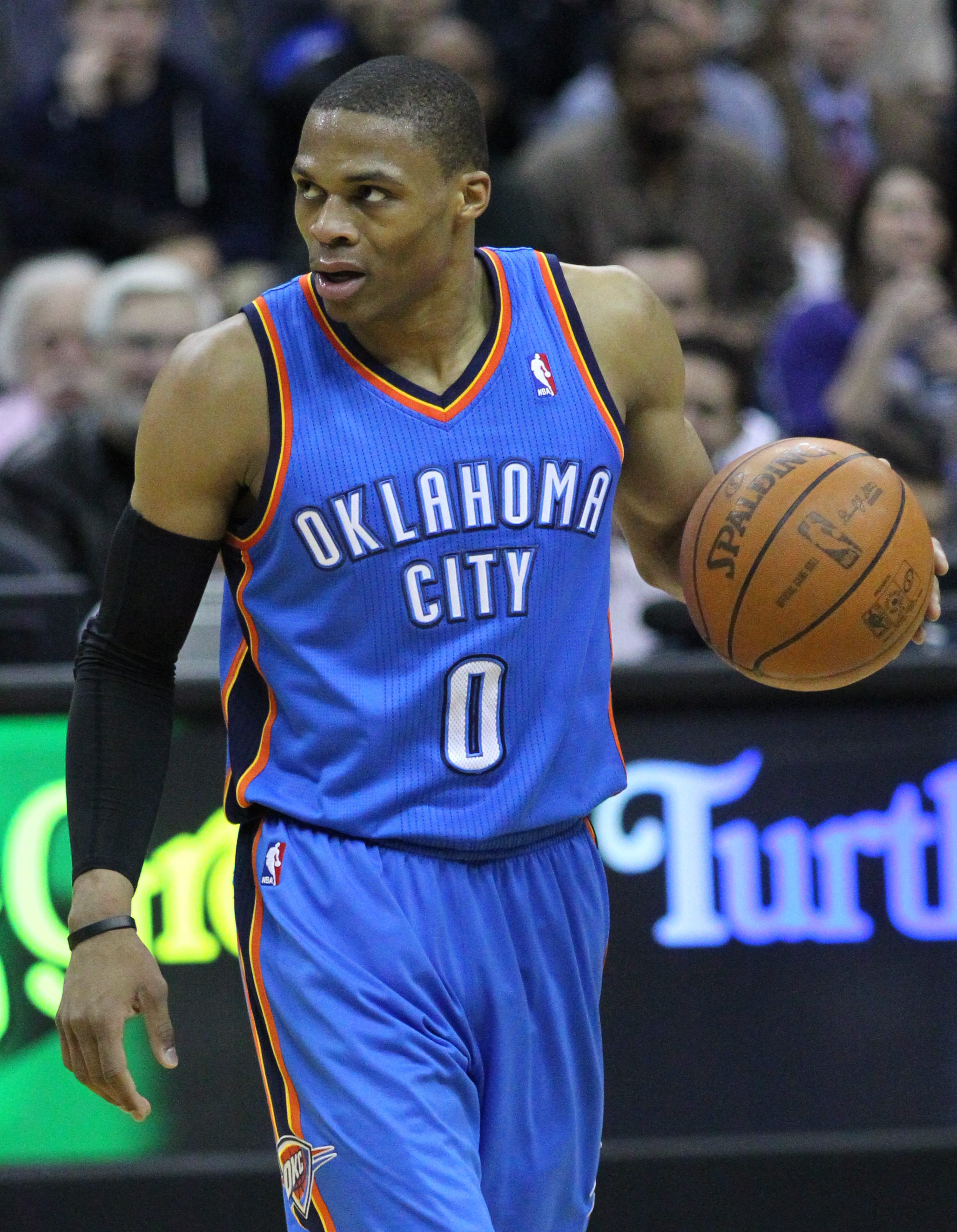 Wizards v/s Thunder 03/14/11